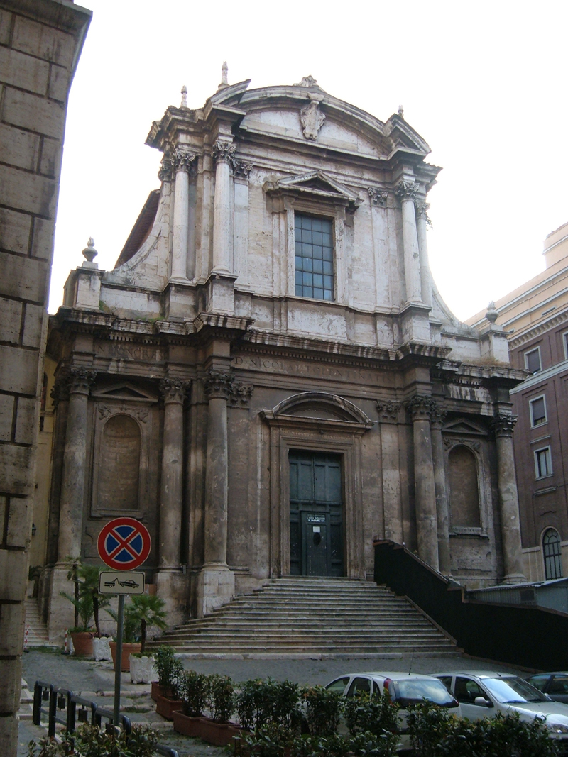 Chiesa di San Nicola da Tolentino, a Roma, nel rione Trevi. Foto personale.